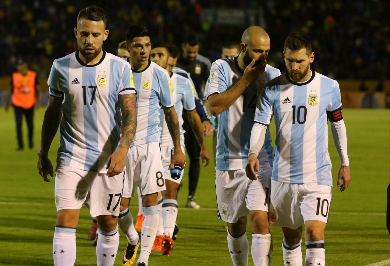 Quito, 10 oct (Andes).- Con tres tantos Argentina espantó los fantasmas de la eliminación, clasificó a su décima octava Copa del Mundo y venció 3-1 a un Ecuador que inició ganando el compromiso, disputado en el estadio Atahualpa de Quito, pero que no supo contener a uno de los mejores jugadores del mundo. ANDES/Micaela Ayala V.